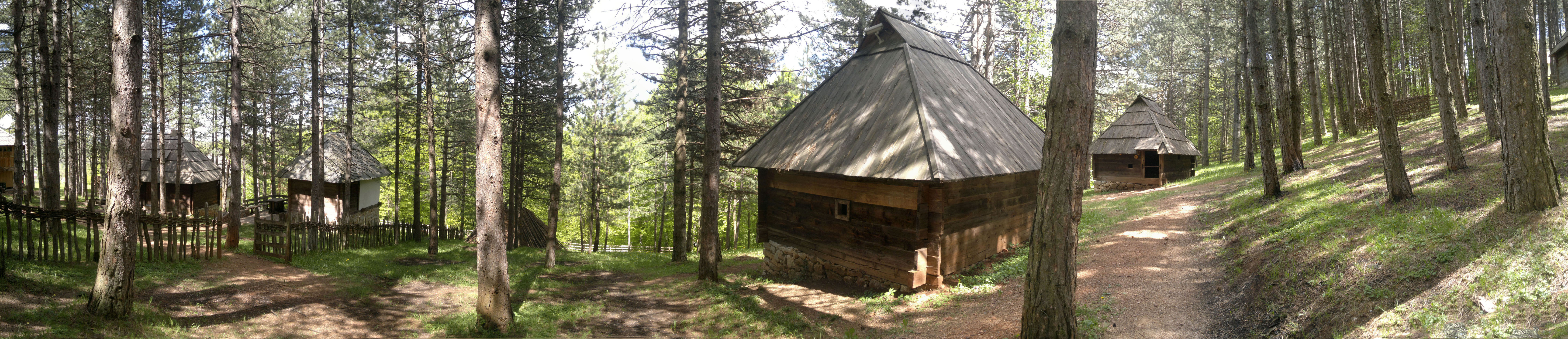 Zlatiborsko selo